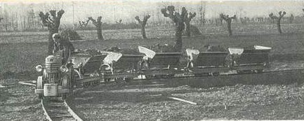 Same Trattori "4R"-10 con rugte metalliche per Decauville